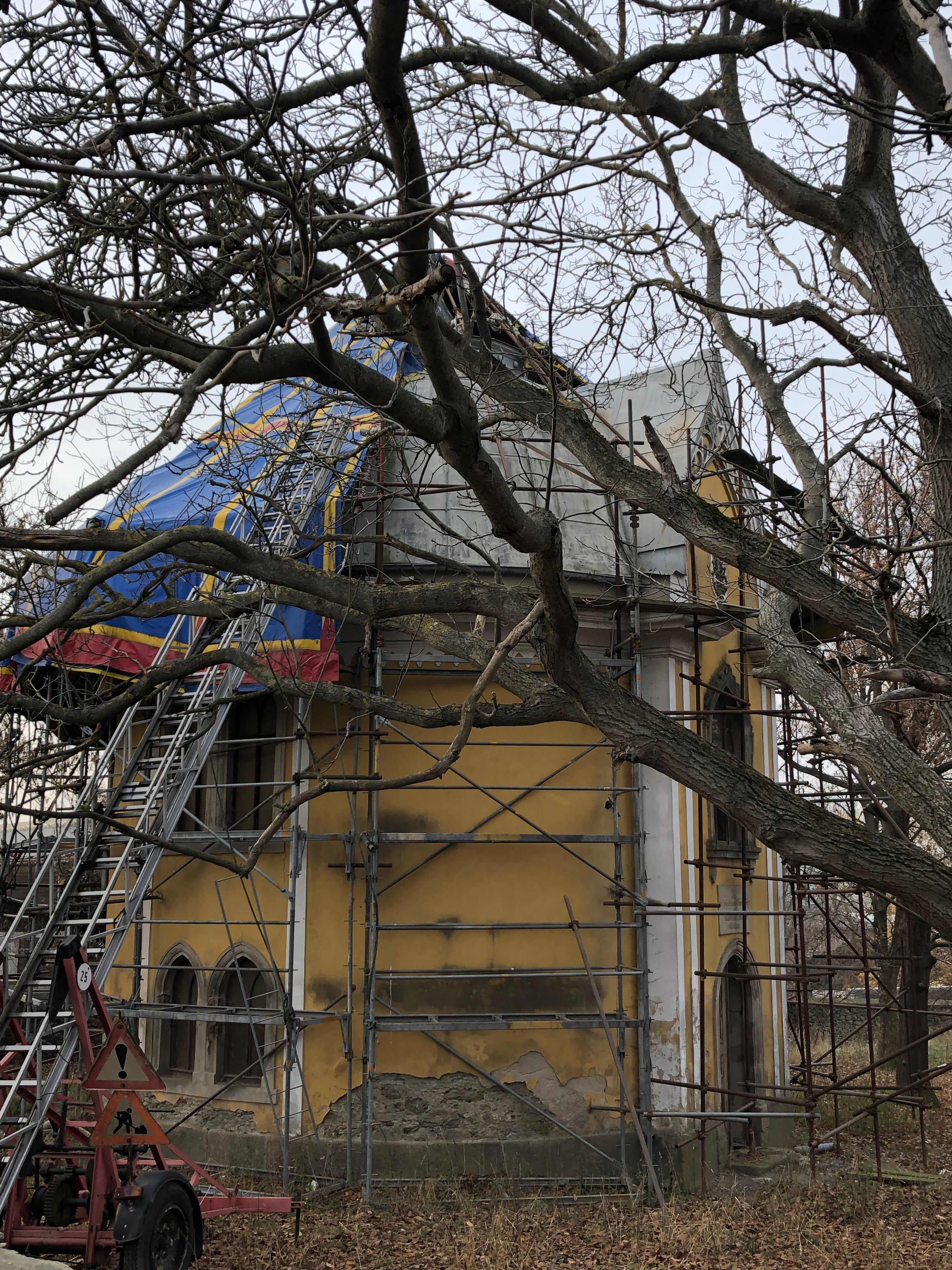 Kapelle im Schlosspark Christgrün